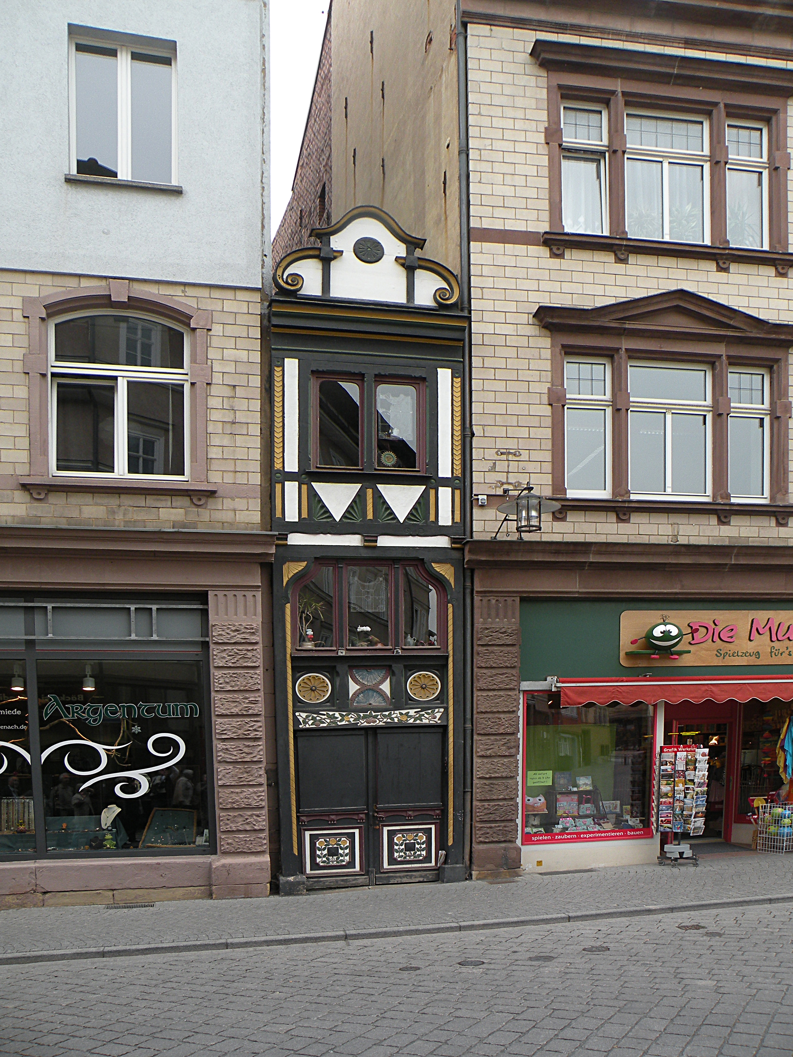 Самый узкий дом города